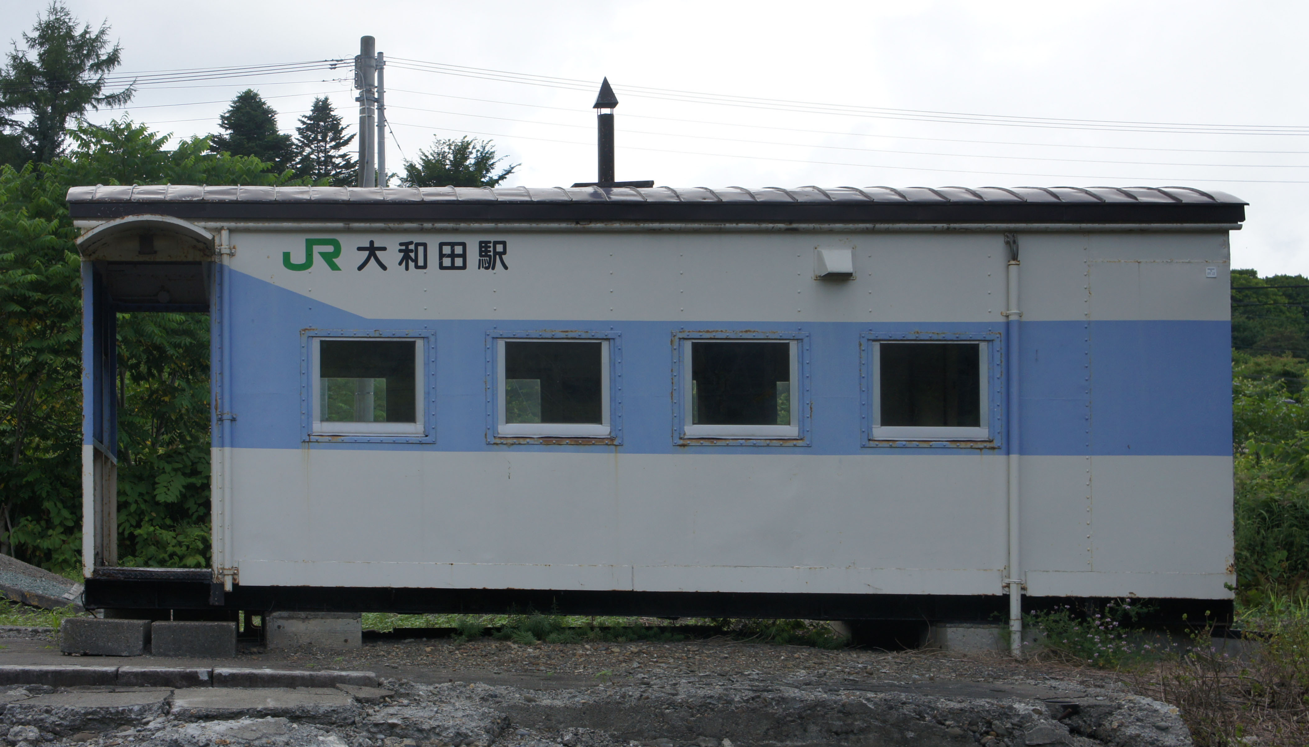 JR留萌本線・大和田駅の駅舎